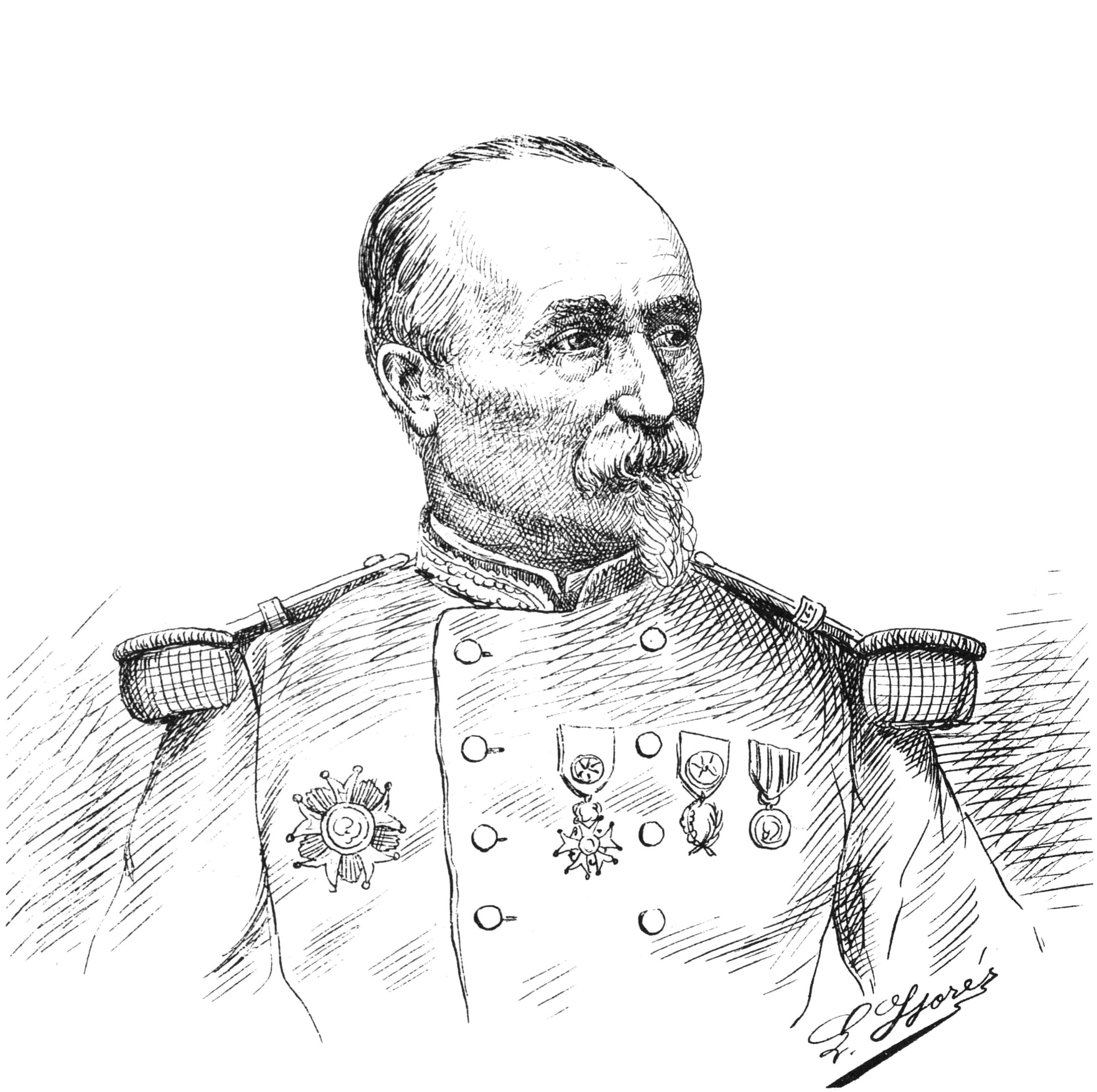 "Le général Thibaudin".